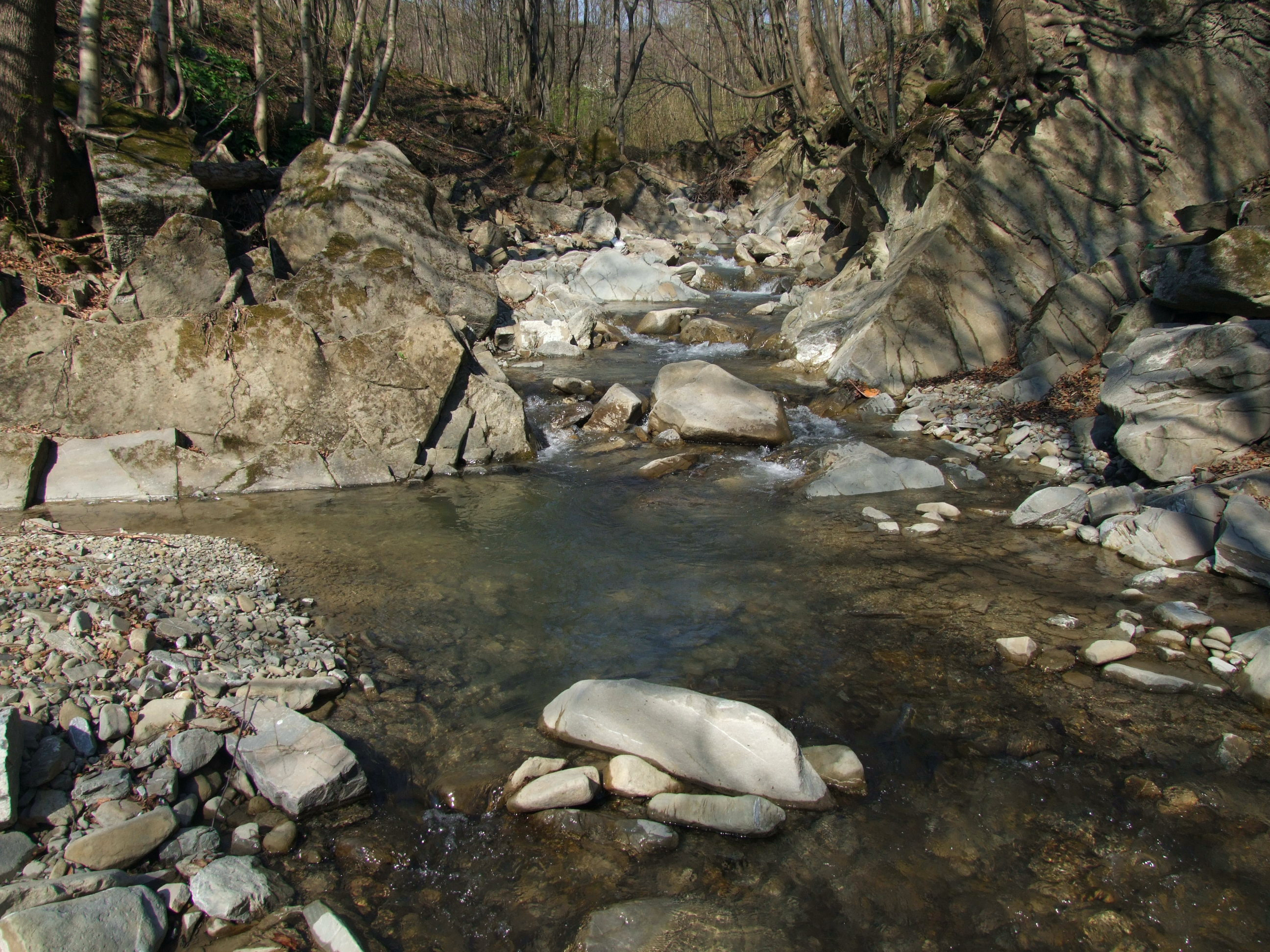 "Głęboki Jar" na Życzanowskim Potoku